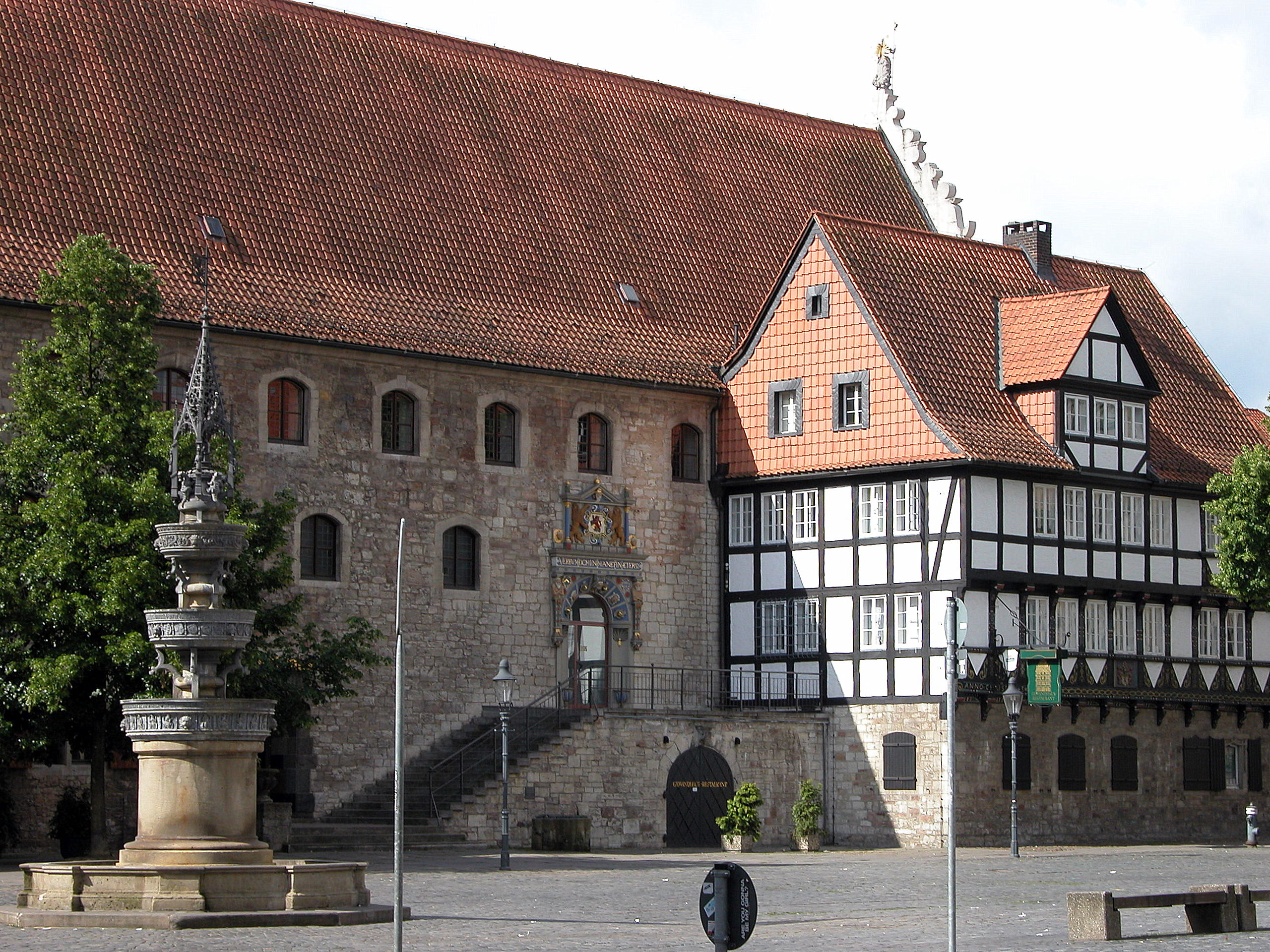 Braunschweig: Altstadtmarktbrunnen (links), Gewandhaus (Mitte) und Ehemaliges Rüninger Zollhaus (rechts).